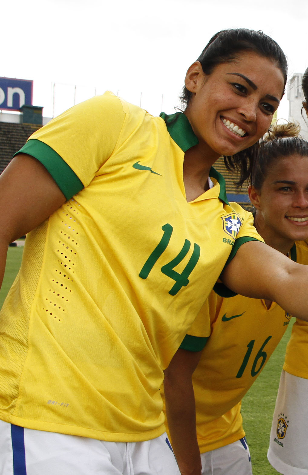 Quito, 28 sep (Andes).- La selección brasileña femenina de fútbol se proclamó Campeona de la Copa América de Fútbol Ecuador 2014. Foto: Micaela Ayala V./Andes